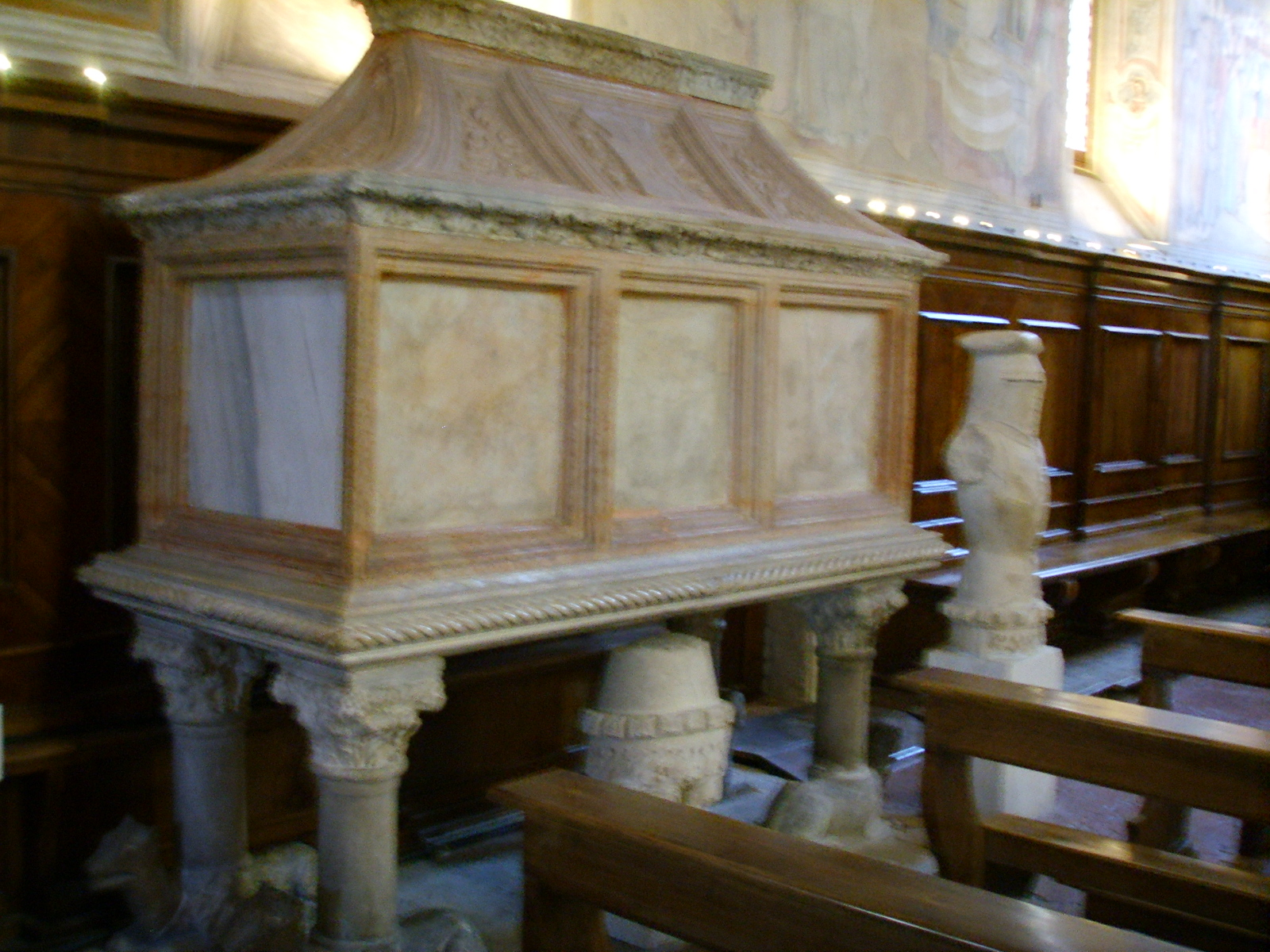 Padova, oratorio di san giorgio, arca